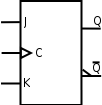 Schéma d'une bascule JK